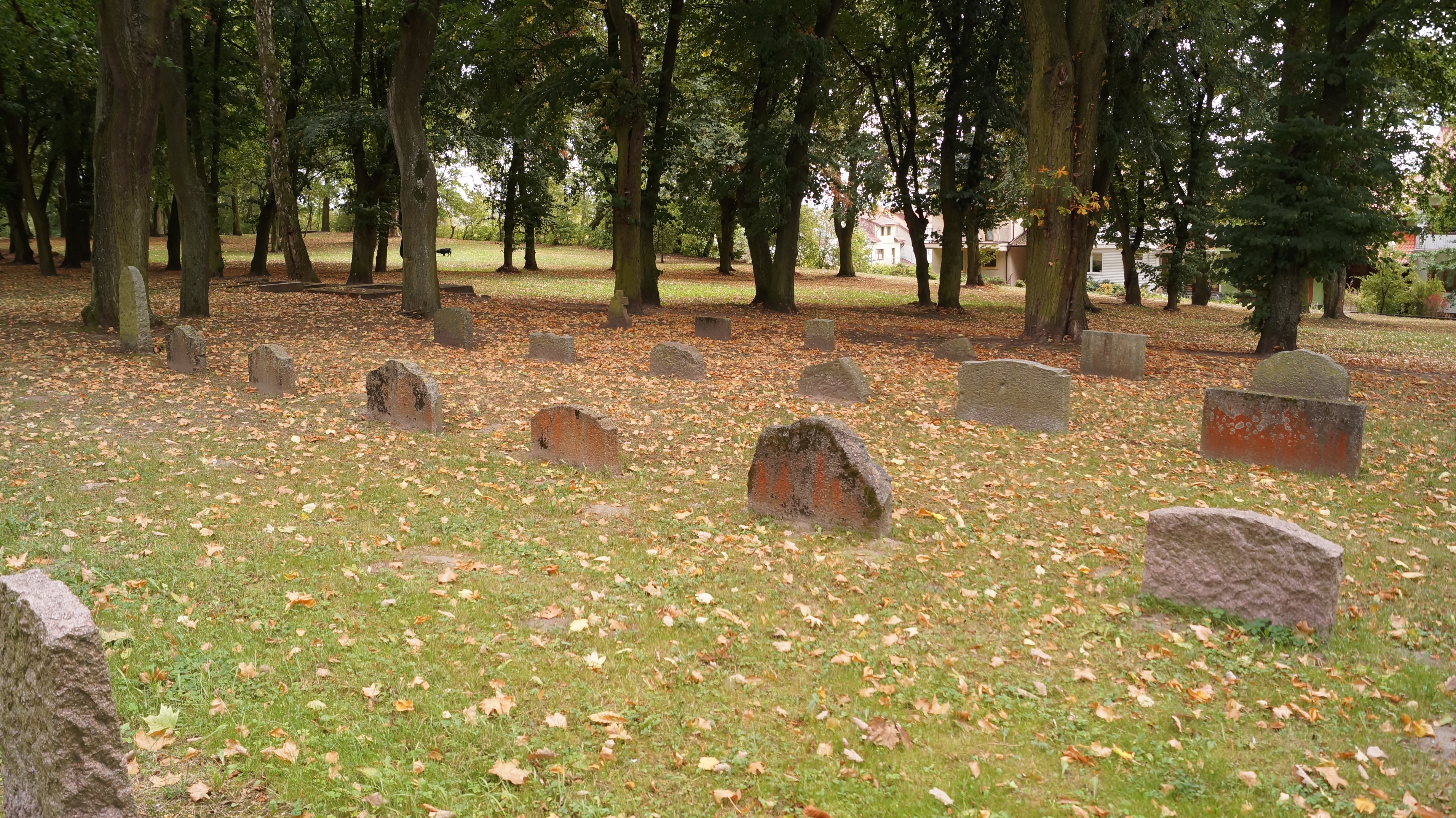 Elbląg, cmentarz